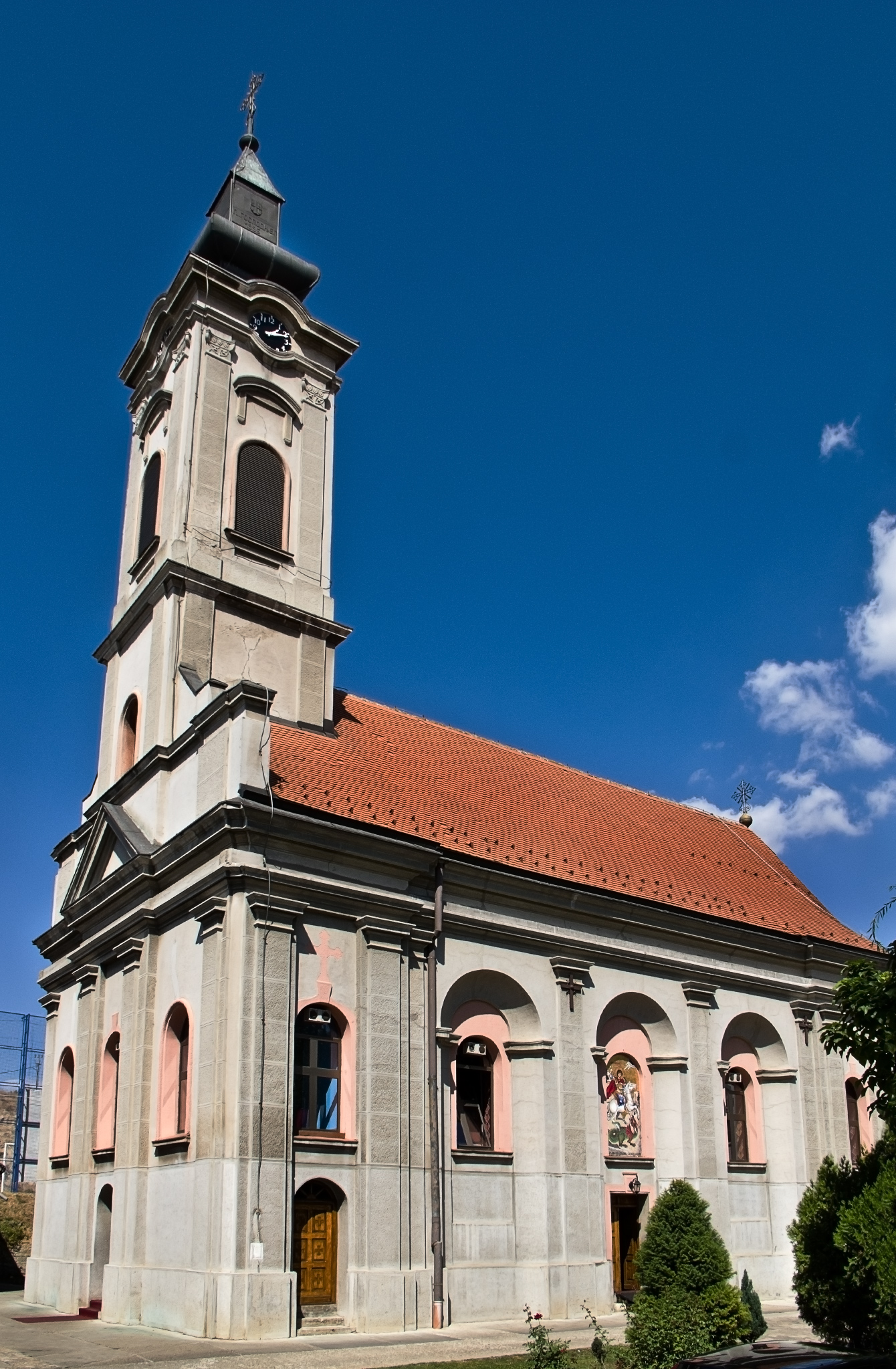 Црква Светог Георгија у Београду, Војвођанска 70, Бежанија, Земун, Београд, Србија